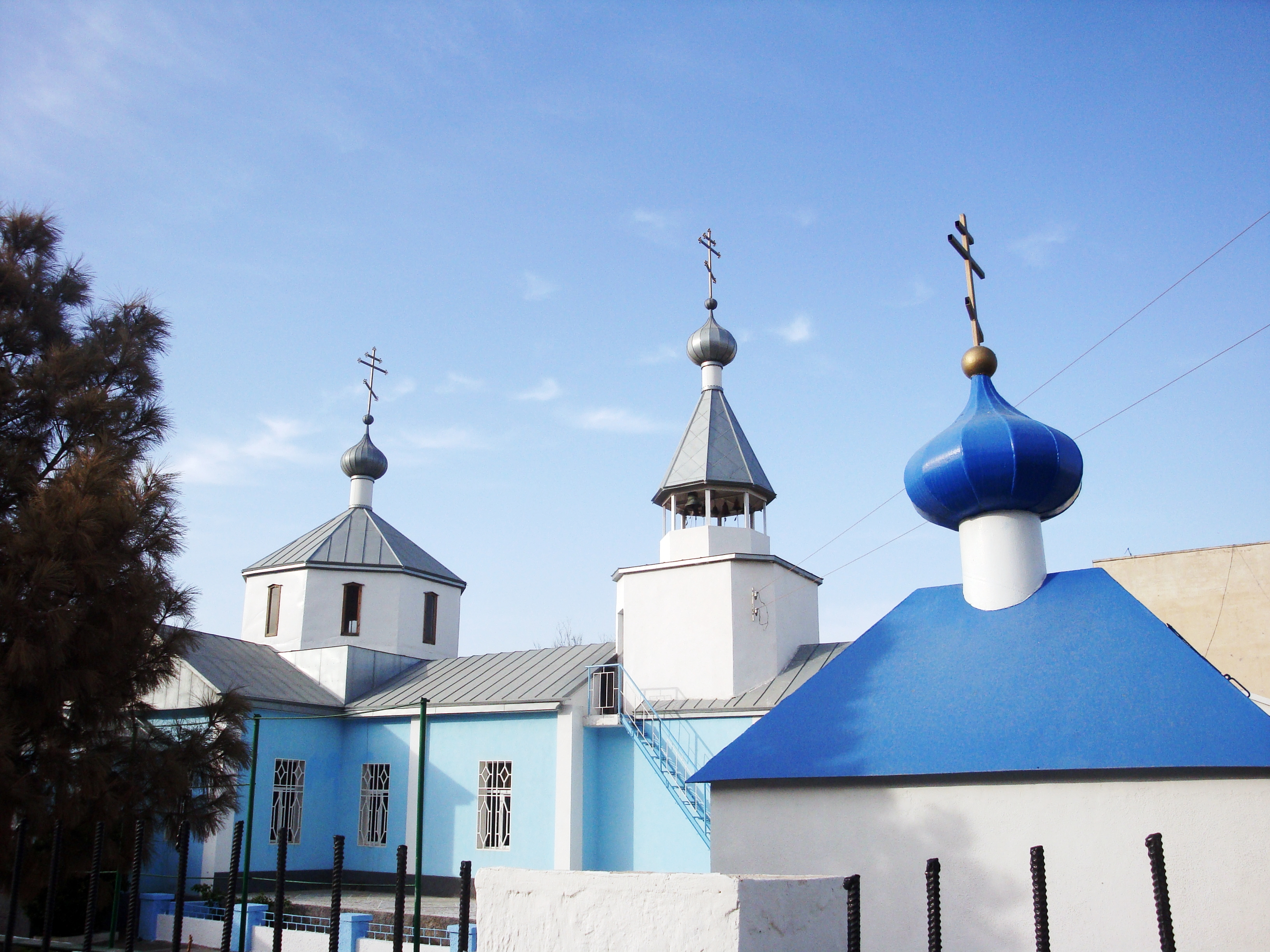 Храм Архистратига Михаила Туркменбаши (бывший Красноводск)